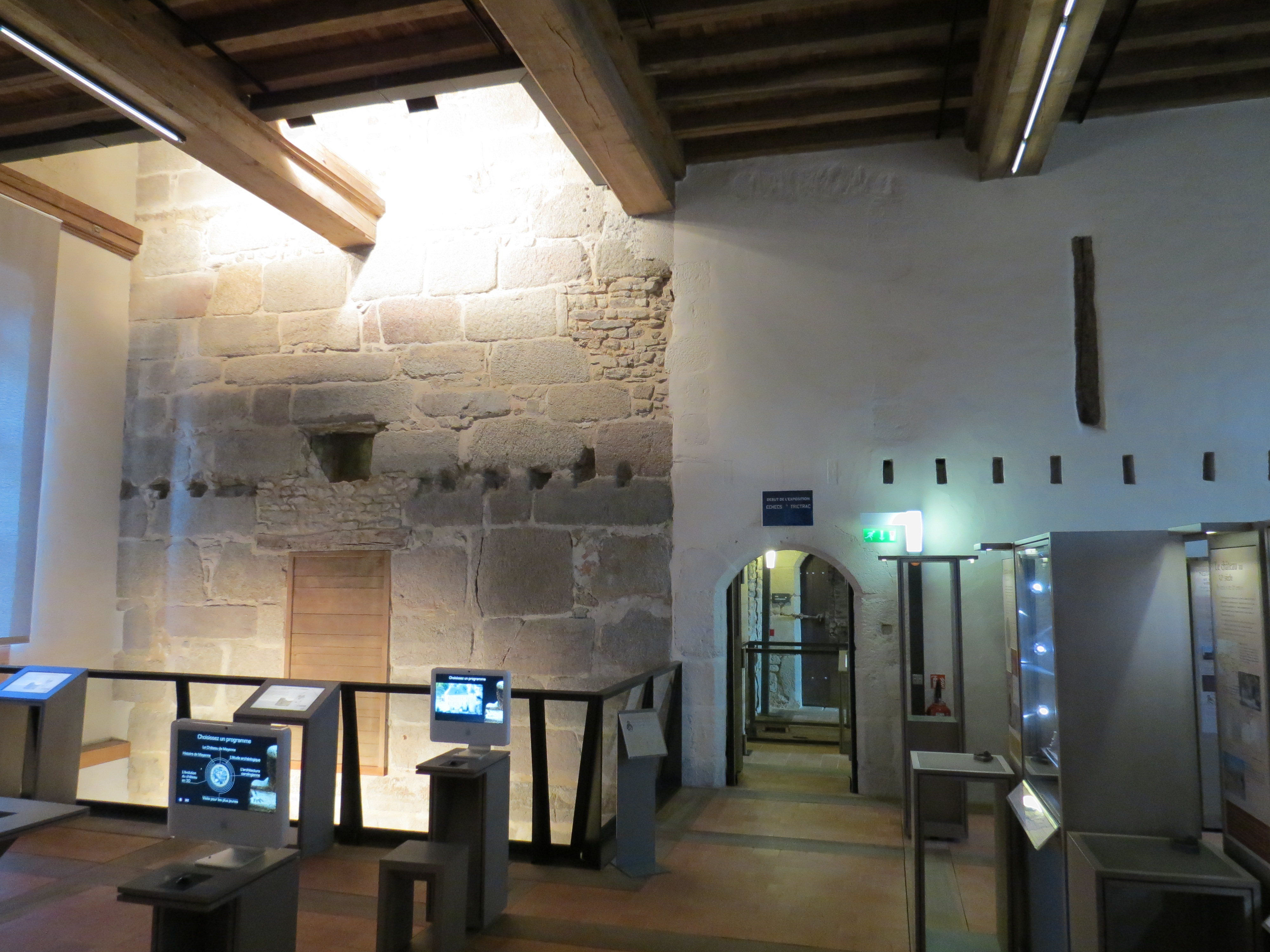 Palais carolingien du château de Mayenne, Pays de la Loire.